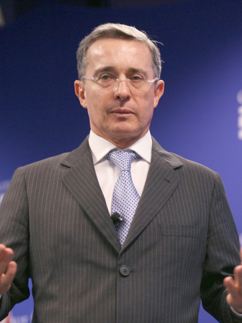 Álvaro Uribe Velez, President of Colombia.